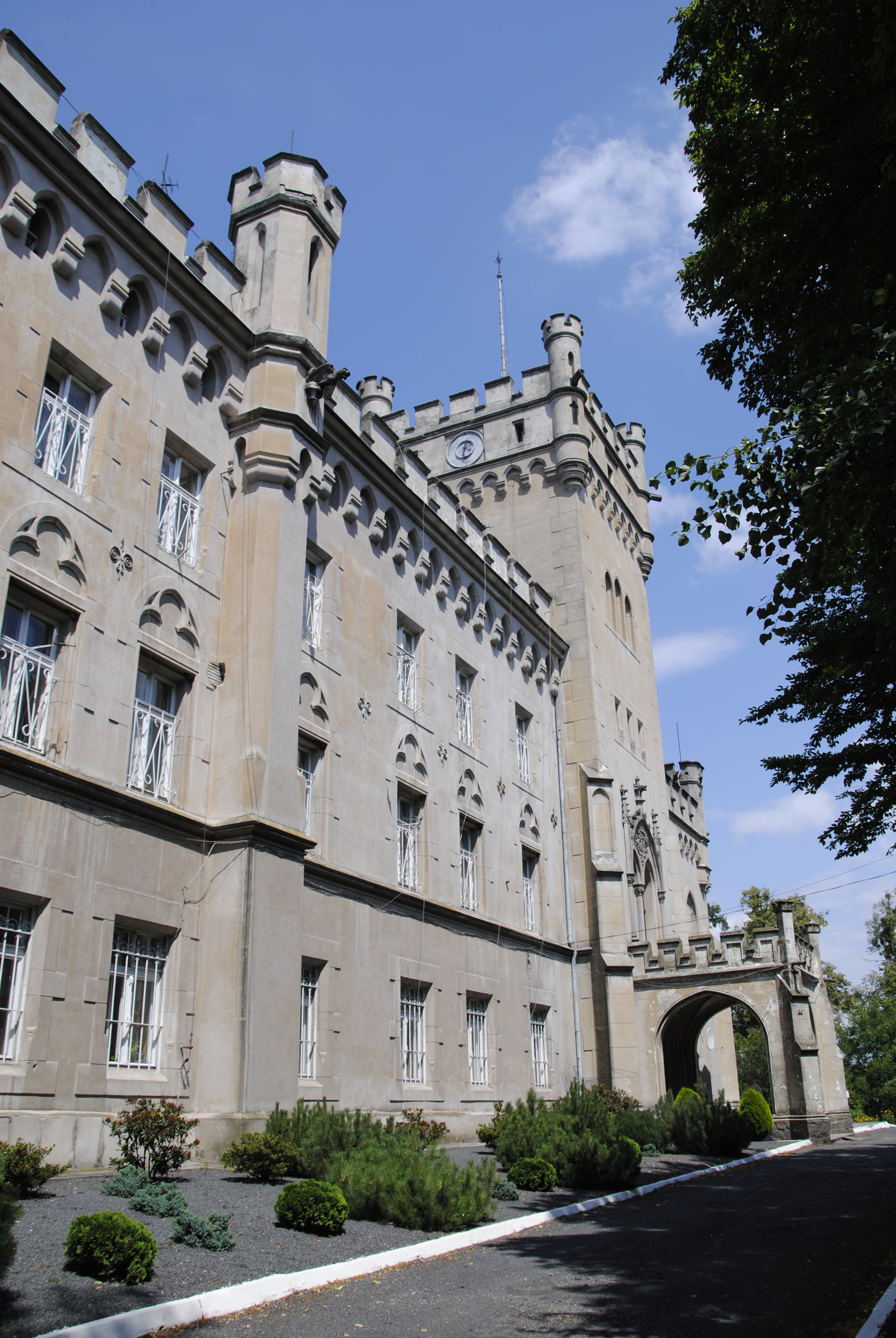 Jędrzejów - pałac w stylu neogotyku angielskiego, obecnie dom opieki społecznej, 1884